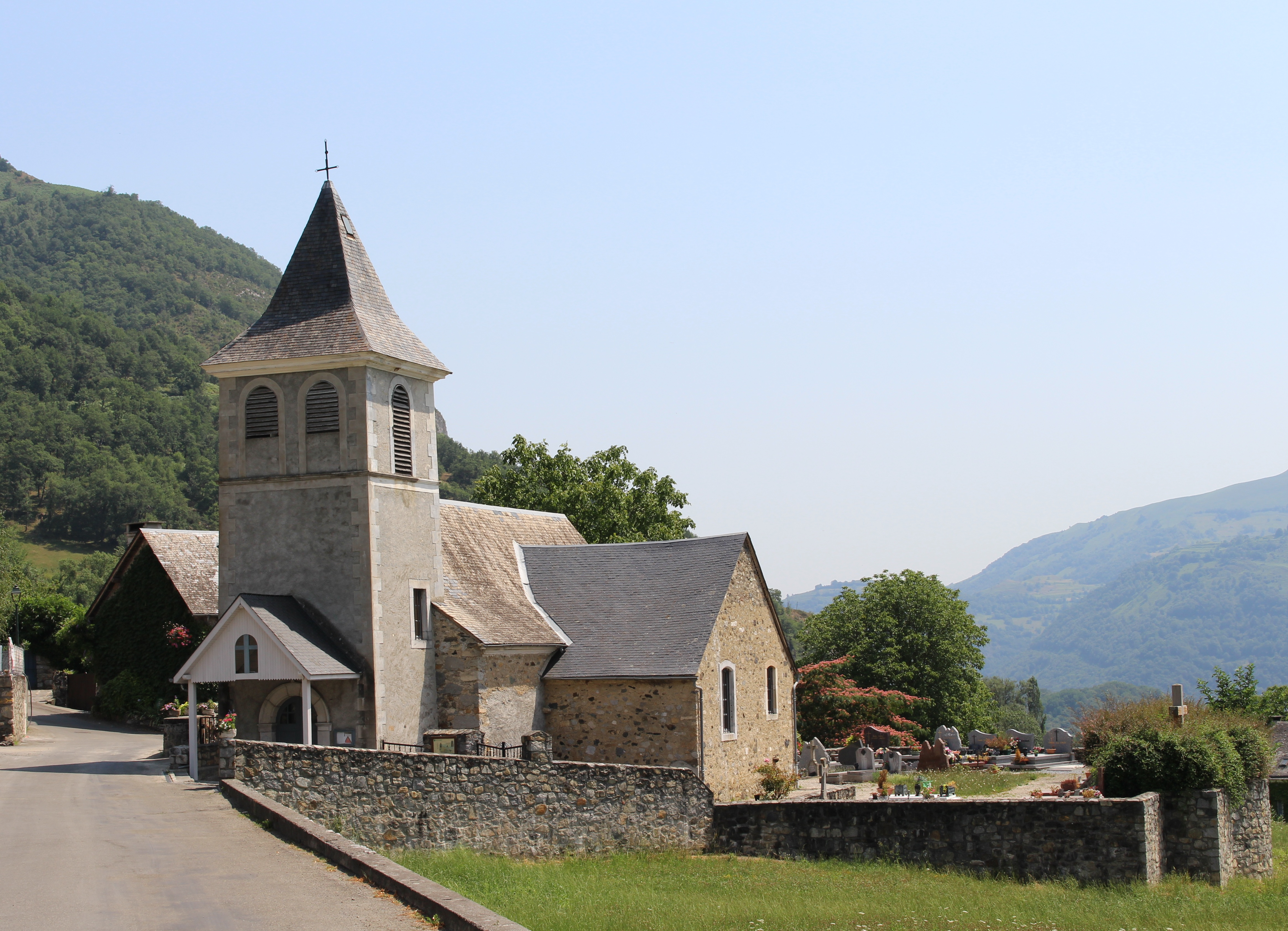 Église Notre-Dame-de-l'Assomption d'Ouzous (Hautes-Pyrénées)